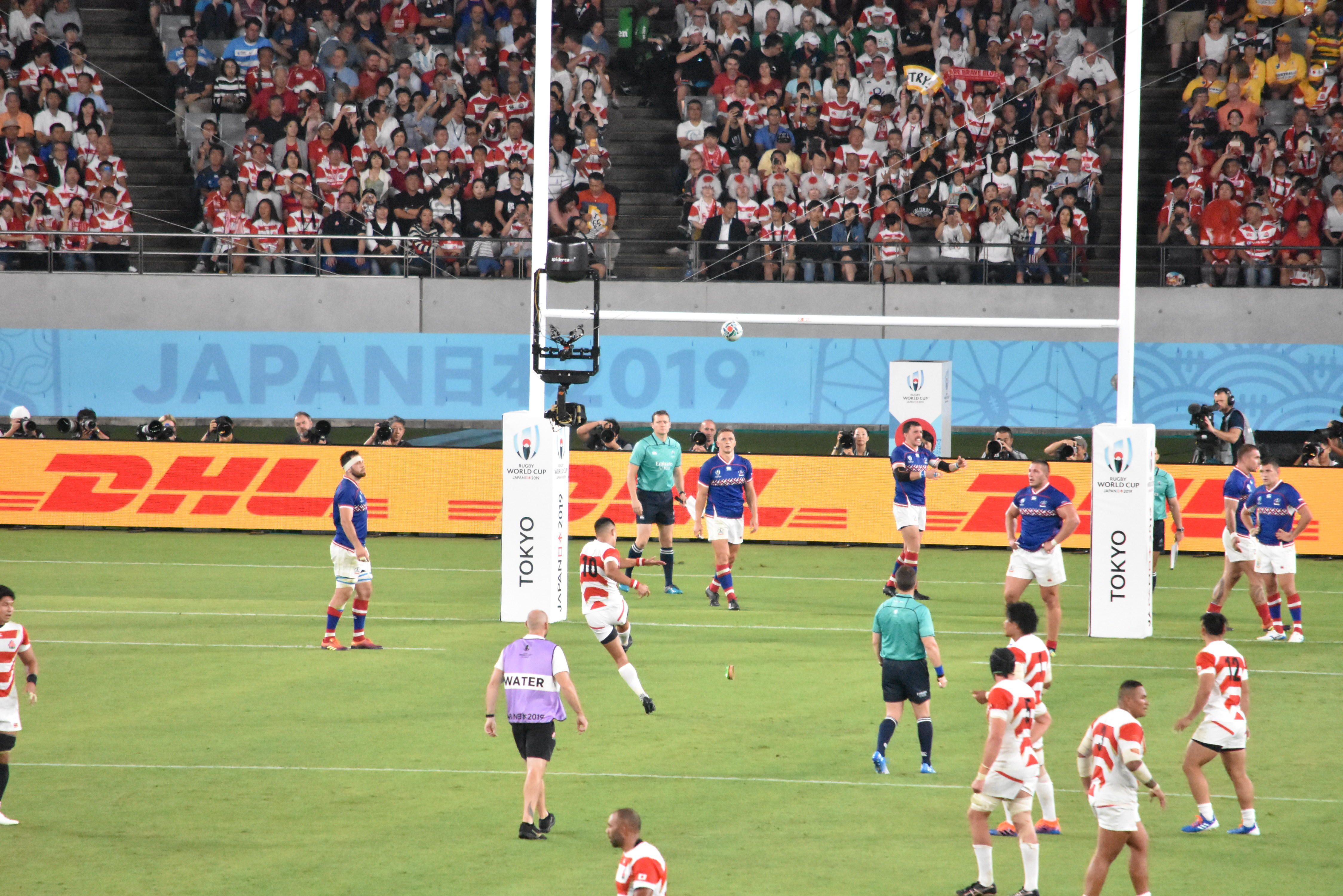 ラグビーワールドカップ 2019